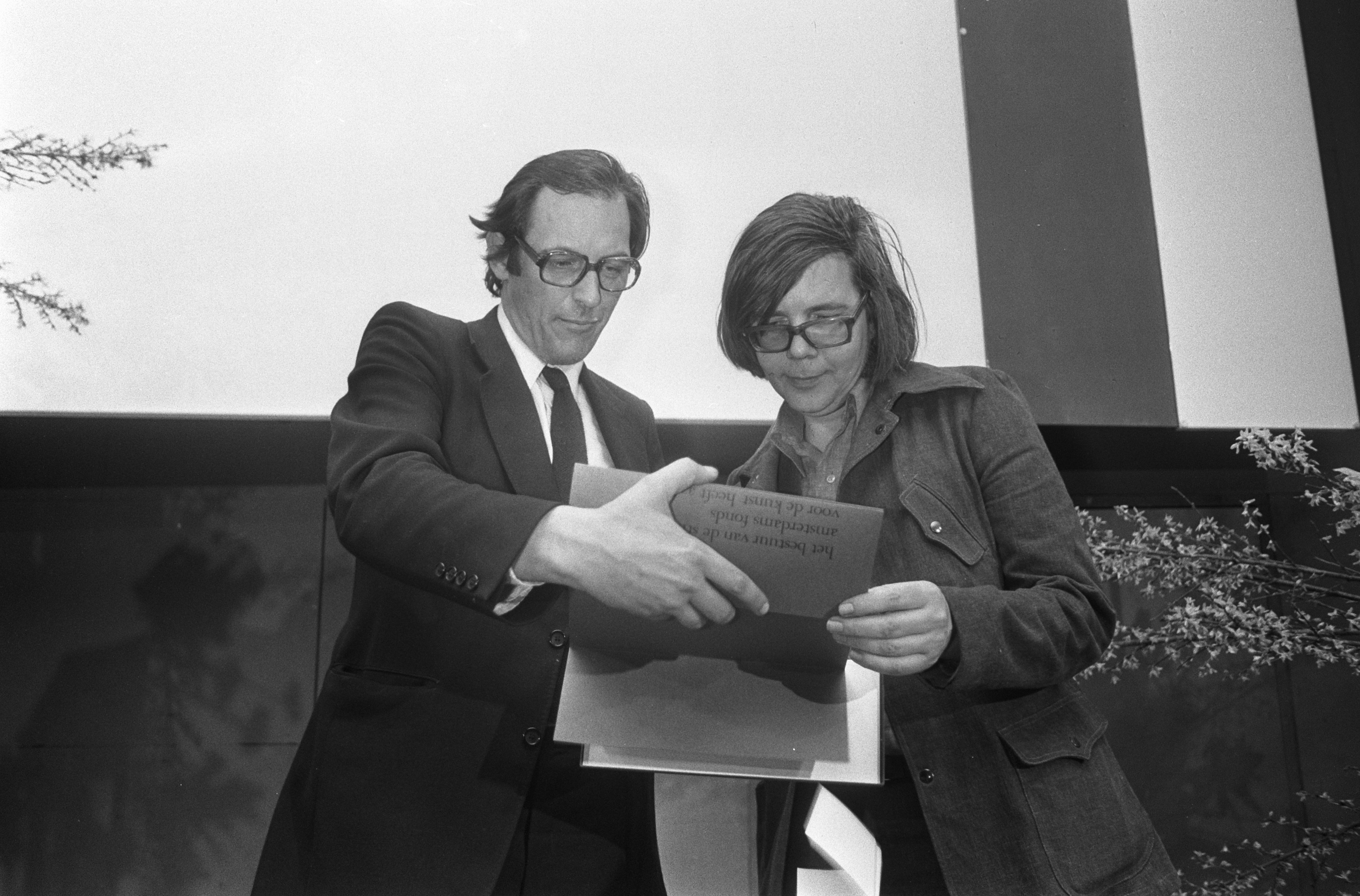 Lammers reikt kunstprijzen uit in Stedelijk Museum ; Lammers overhandigt H. H. ter Balkt (Habakuk II de Balker) de Herman Gorterprijs. 4 april 1974